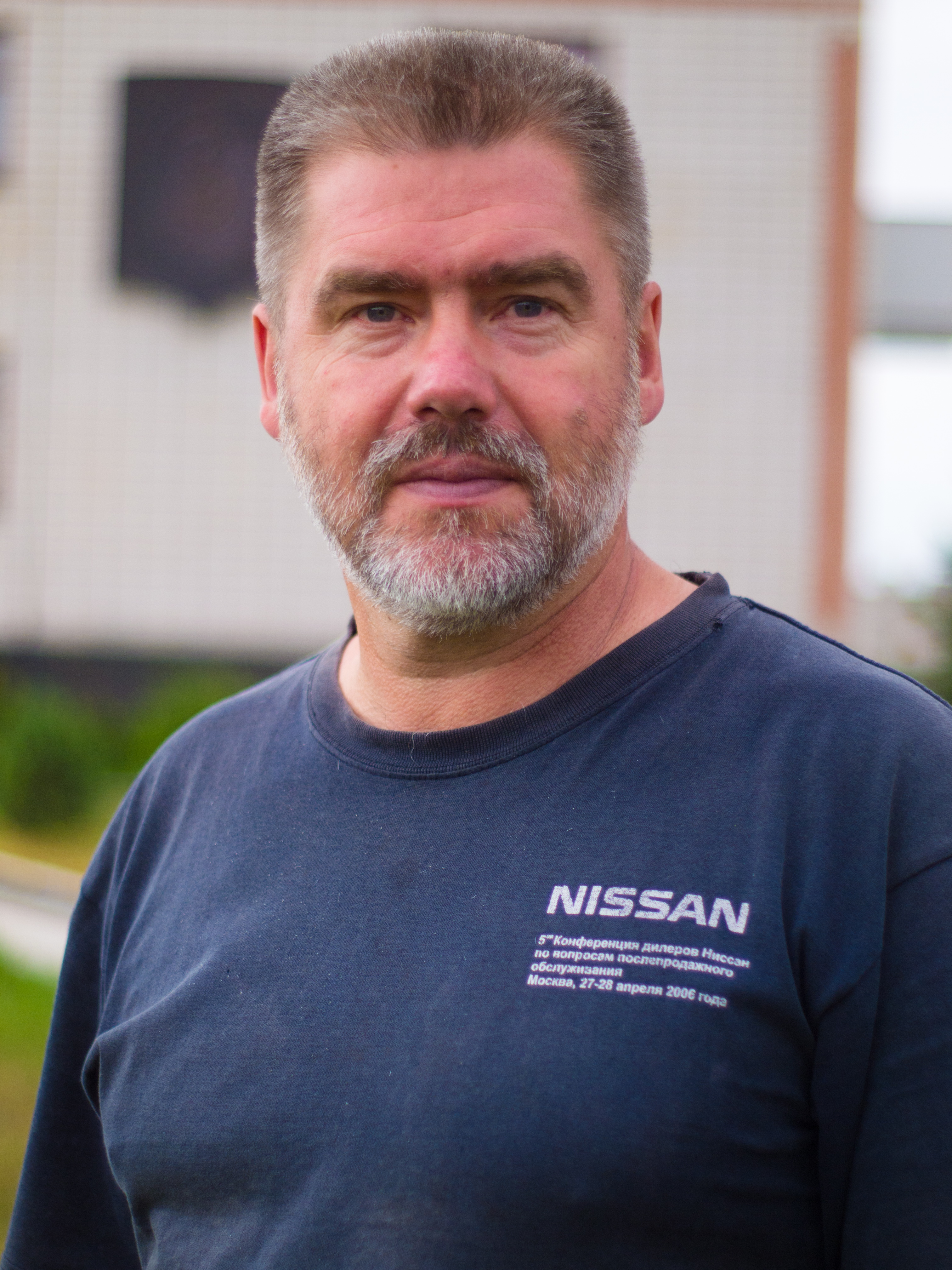 Юрій Іващенко, засновник та керівник Андрушівської астрономічної обсерваторії